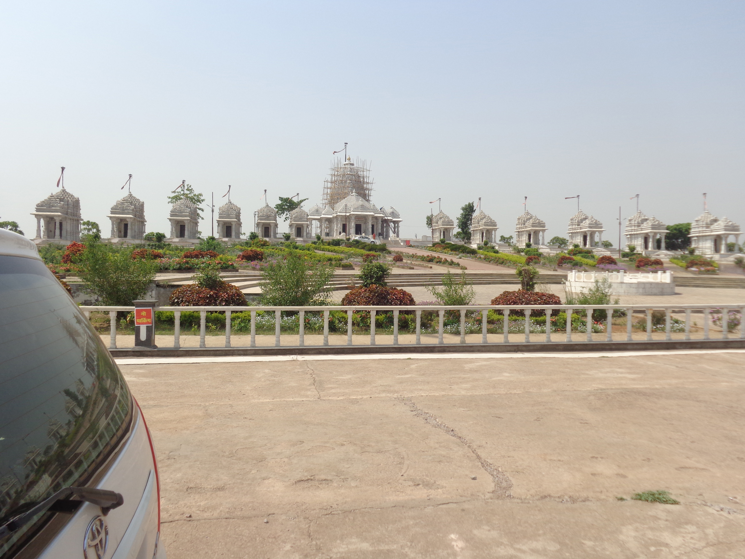 Kaivalydham Jain temple, Raipur is in the banks of kharun nadi. 12 km from the town